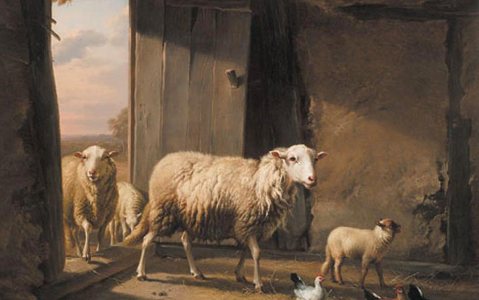 Eugène Joseph Verboeckhoven: Schof